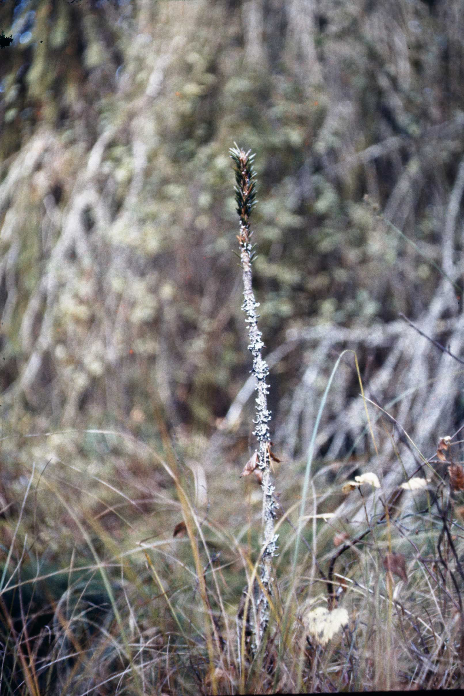 Käppgran, en ormgransvariant fotograferad 1962 på Eskilstorp i Lekeryd, Jönköpings län